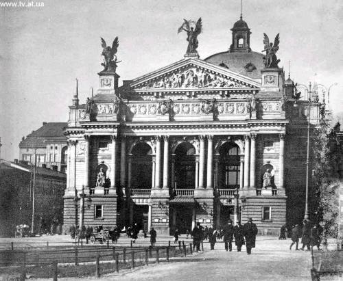 Оперний театр. Львів